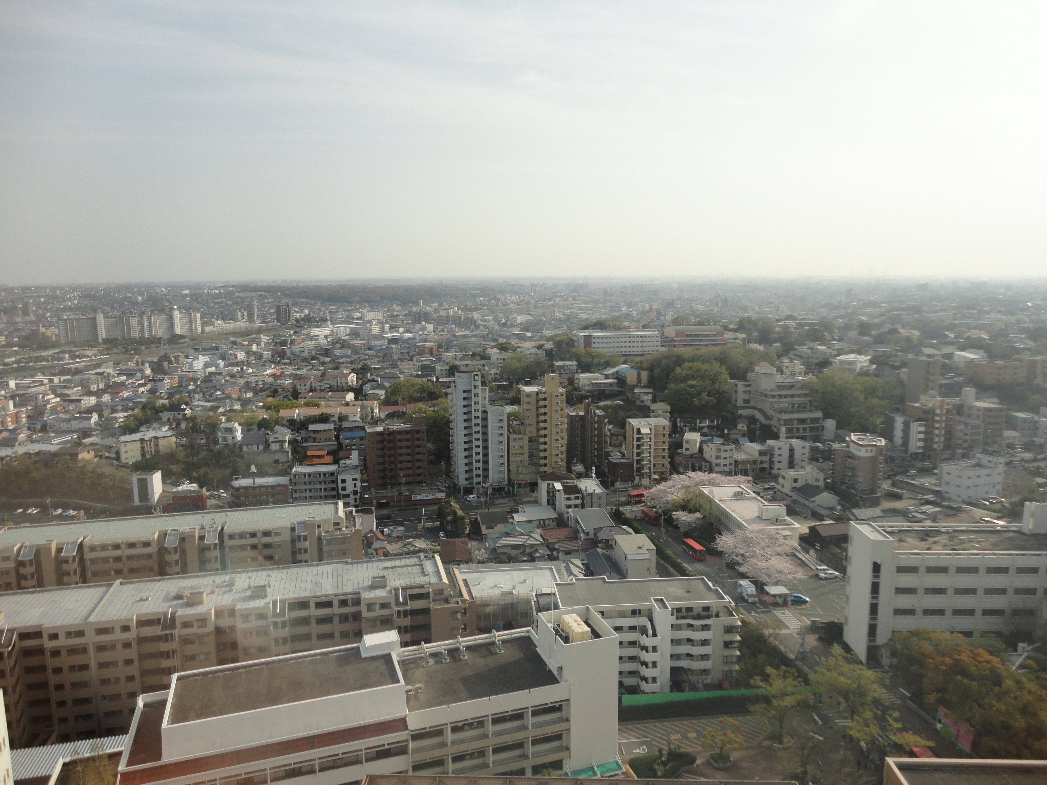 タワー75